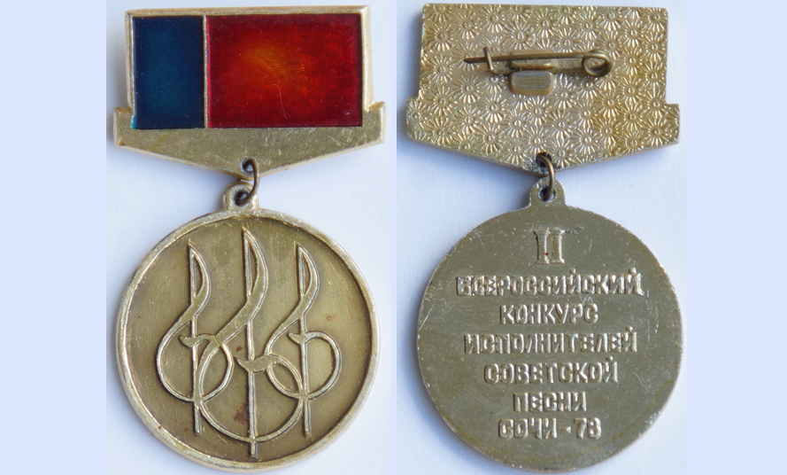 Всероссийский конкурс исполнителей советской песни Сочи-78. фото и монтаж специально для wikipedia